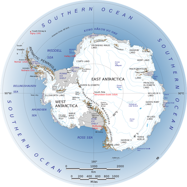 tảng băng